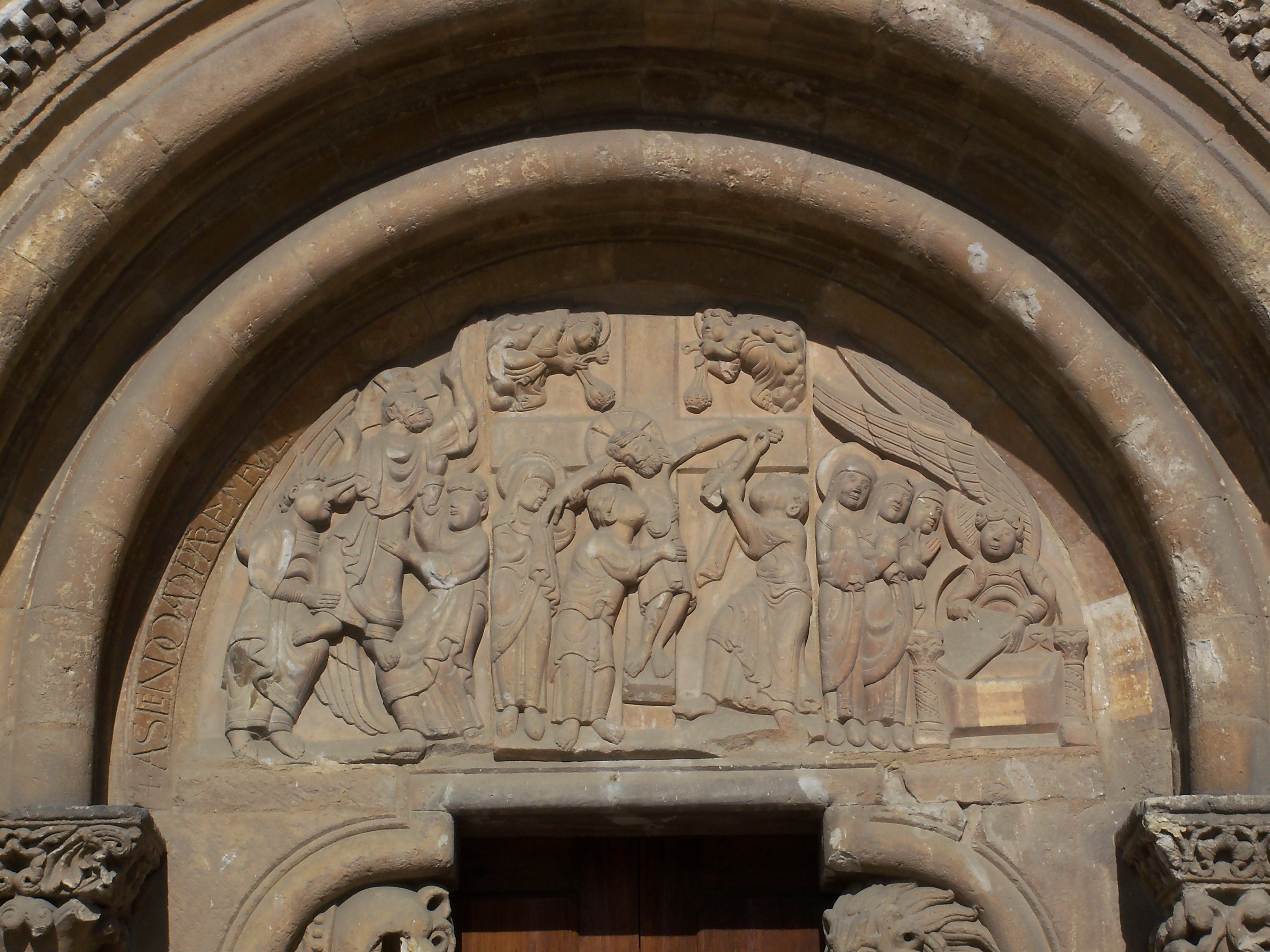 Puerta del Perdón. Tímpano. San Isidoro de León. España